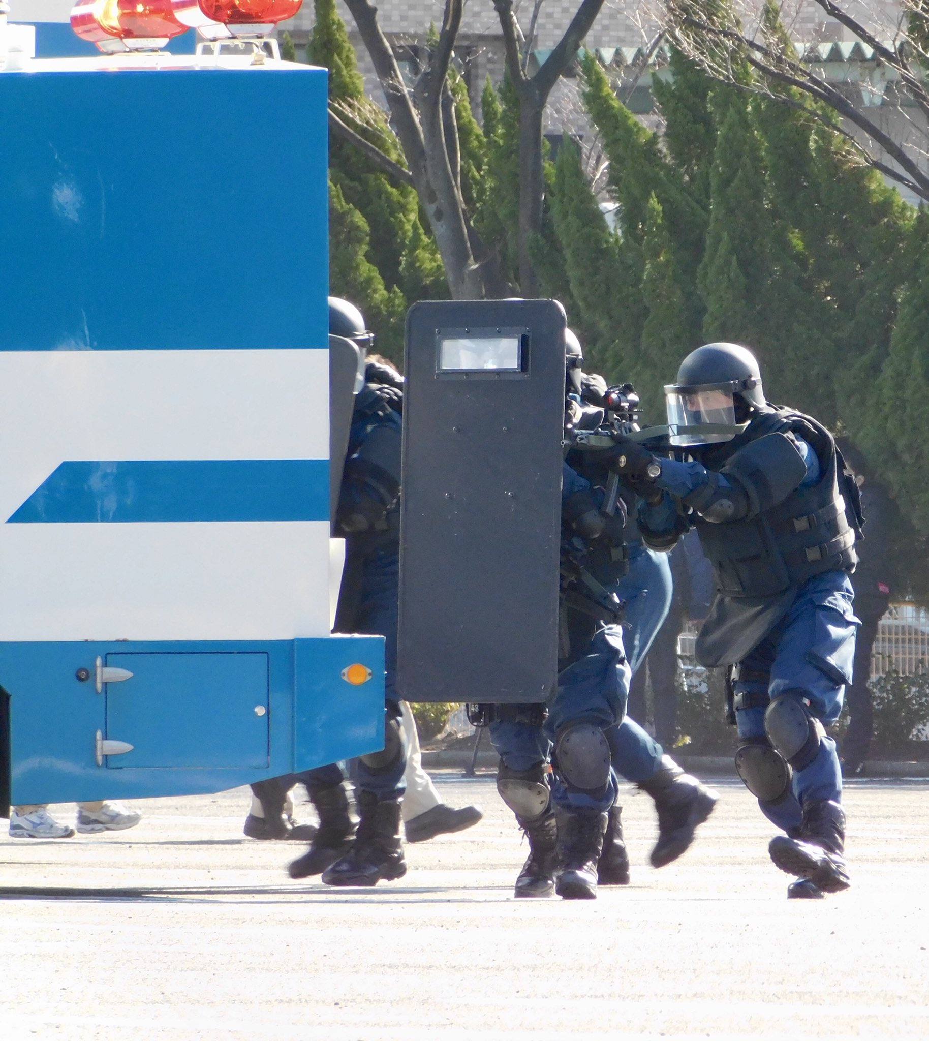 愛知県警察年頭視閲式にて、特型警備車および防弾盾を遮蔽とする銃器対策部隊。